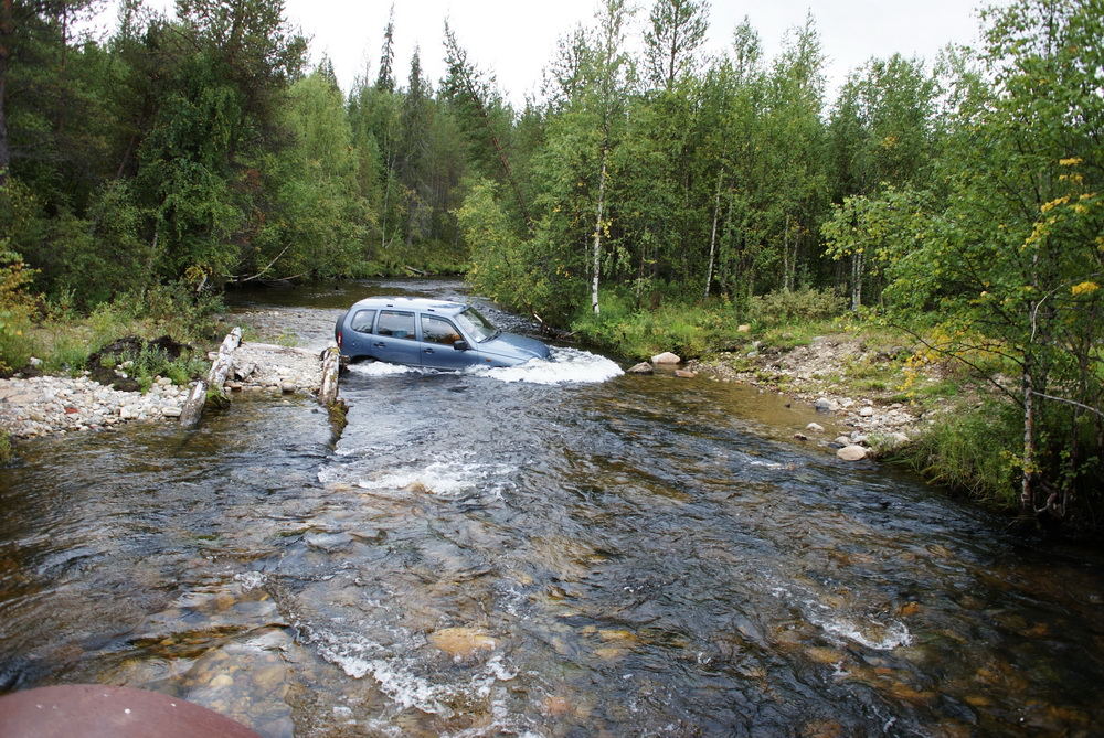 Дорога в верховьях реки Ёна (брод через реку Касси)